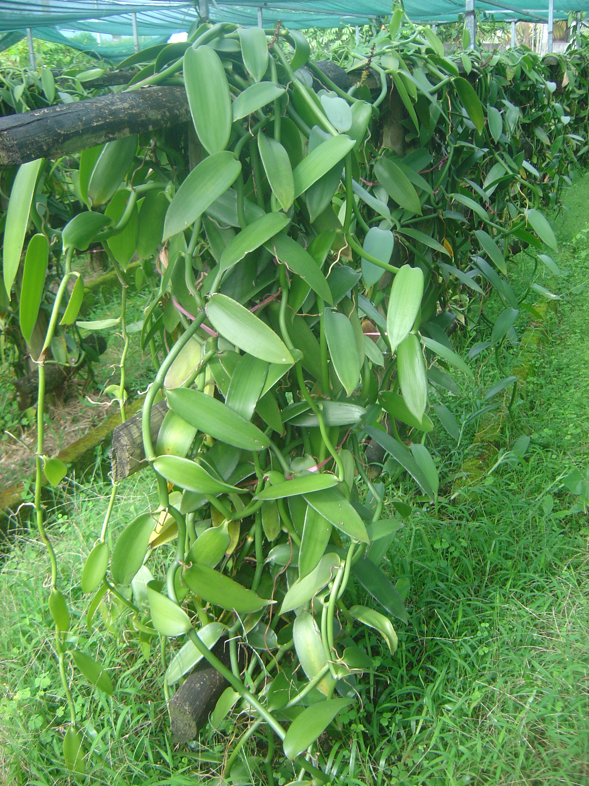 Plantation de vanille sous ombrière. Coopérative de Vanille, Bras-Panon, Île de la Réunion.